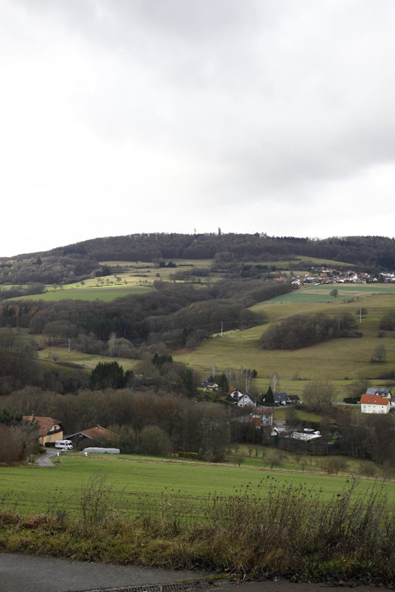 Potzberg, Landkreis Kusel, Blick von Oberstaufenbach.